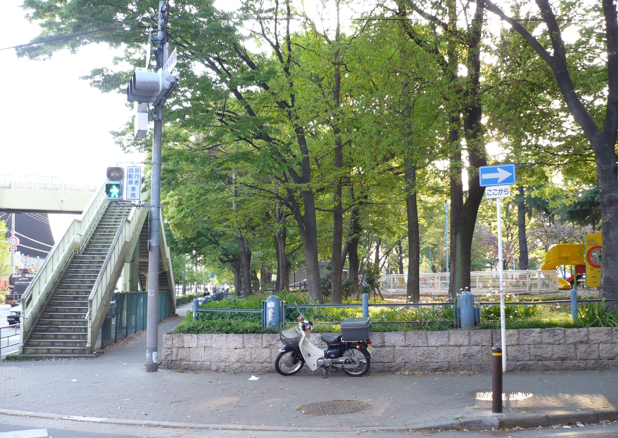 堀城推定地